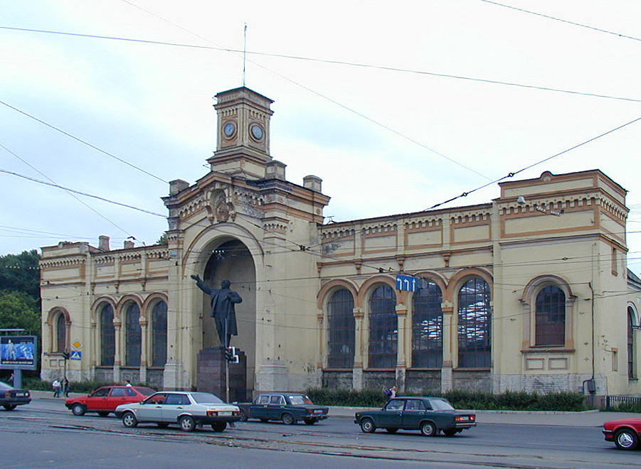 Варшавский вокзал в Санкт-Петербурге